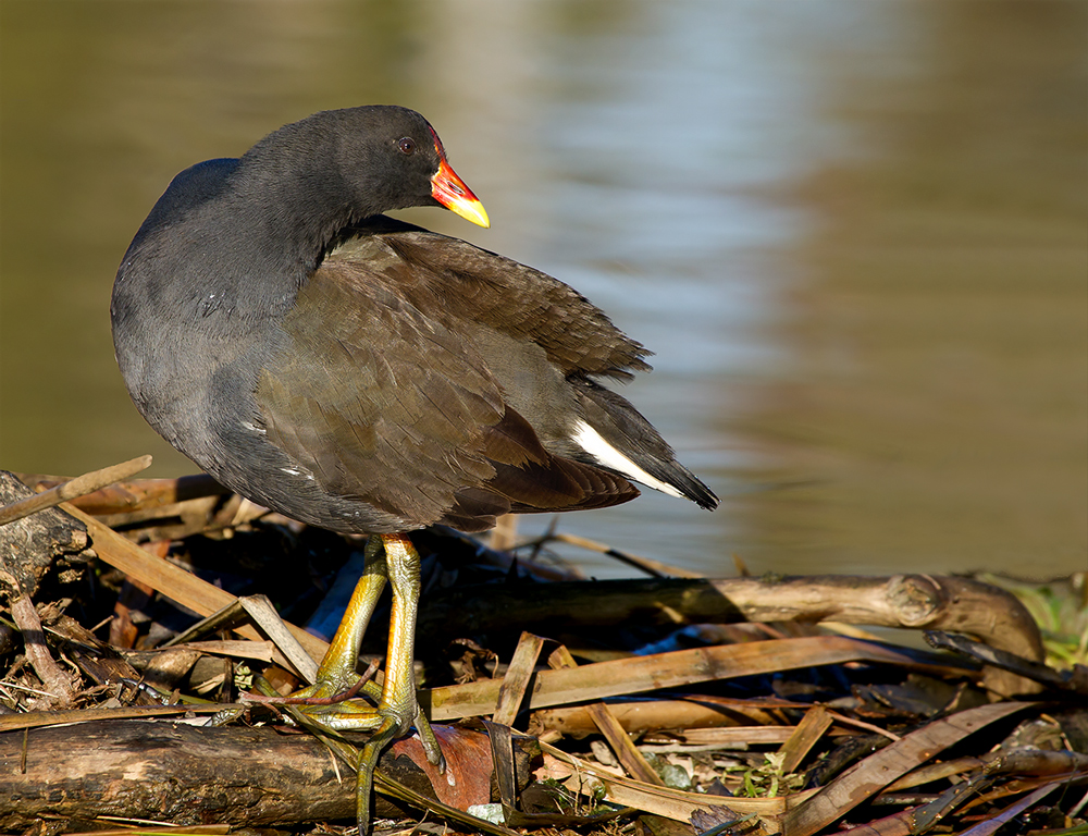 Kangaroo Flat, Vic.